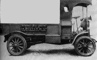 Bovy.